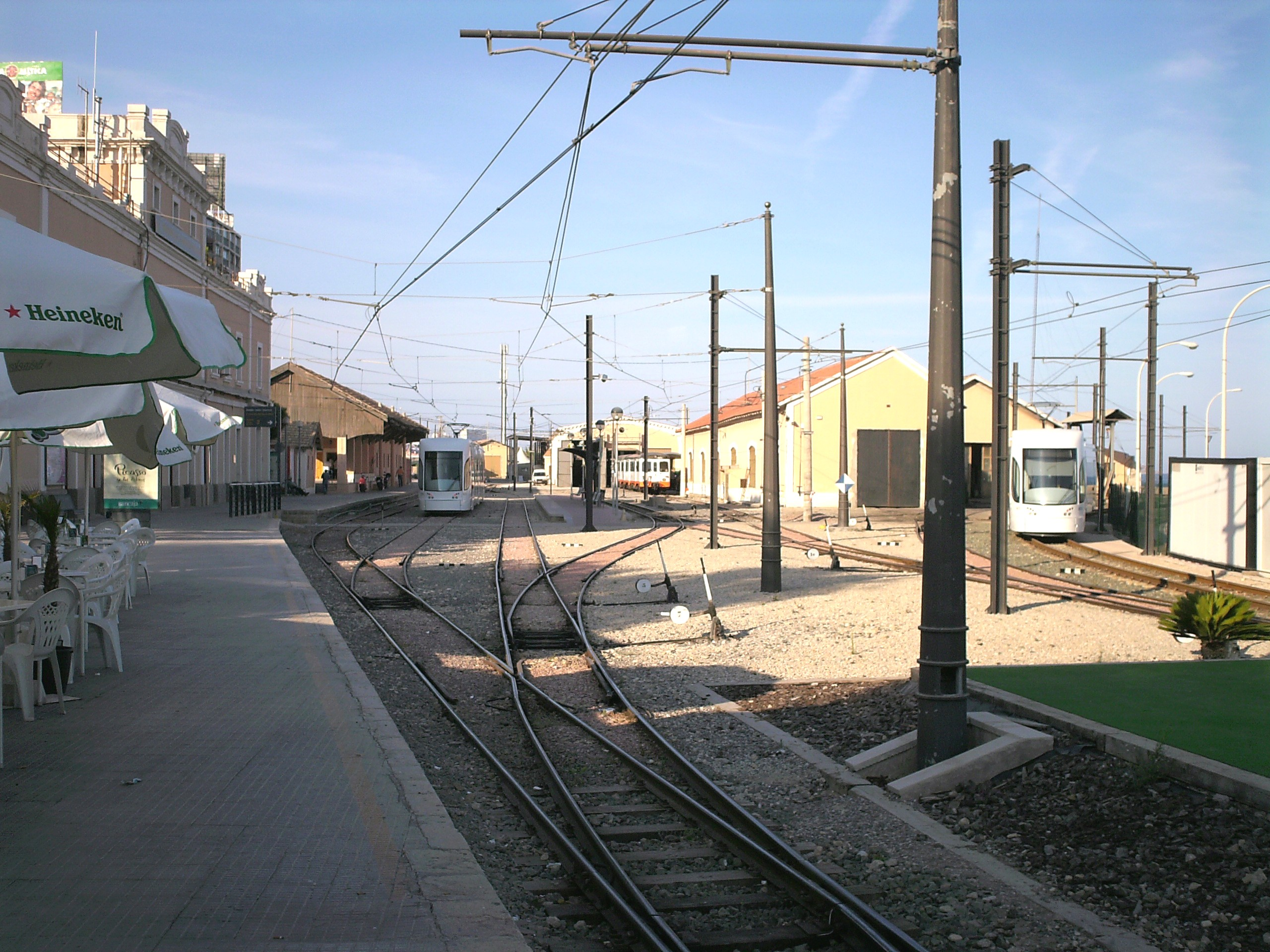 Gleisanlagen des Bahnhofs Alacant - La Marina / Vías de la estación Alicante - La Marina